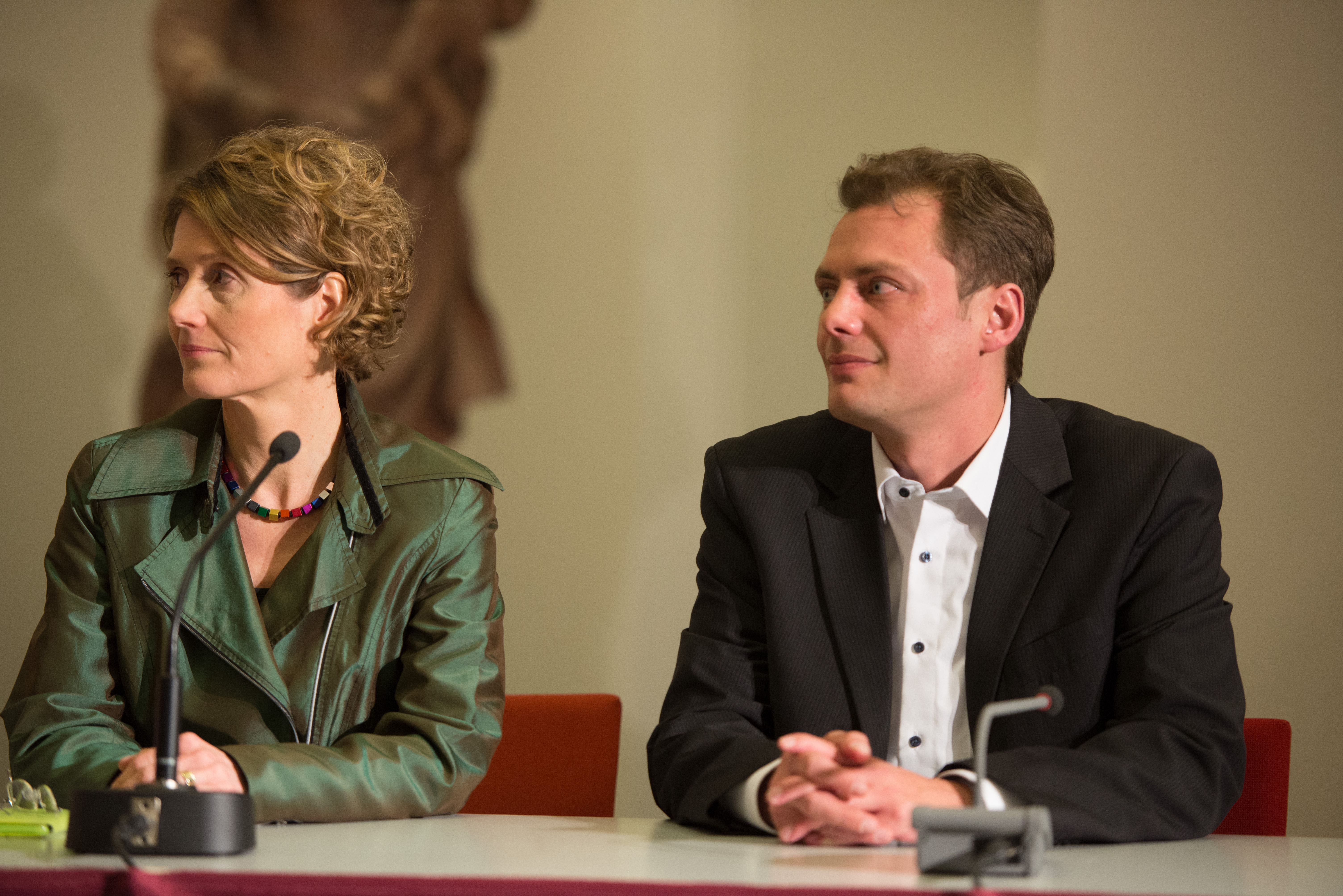 Landespressekonferenz mit den Spitzenkandidaten am Abend der Landtagswahl in Rheinland-Pfalz am 13. März 2016 im Landesmuseum